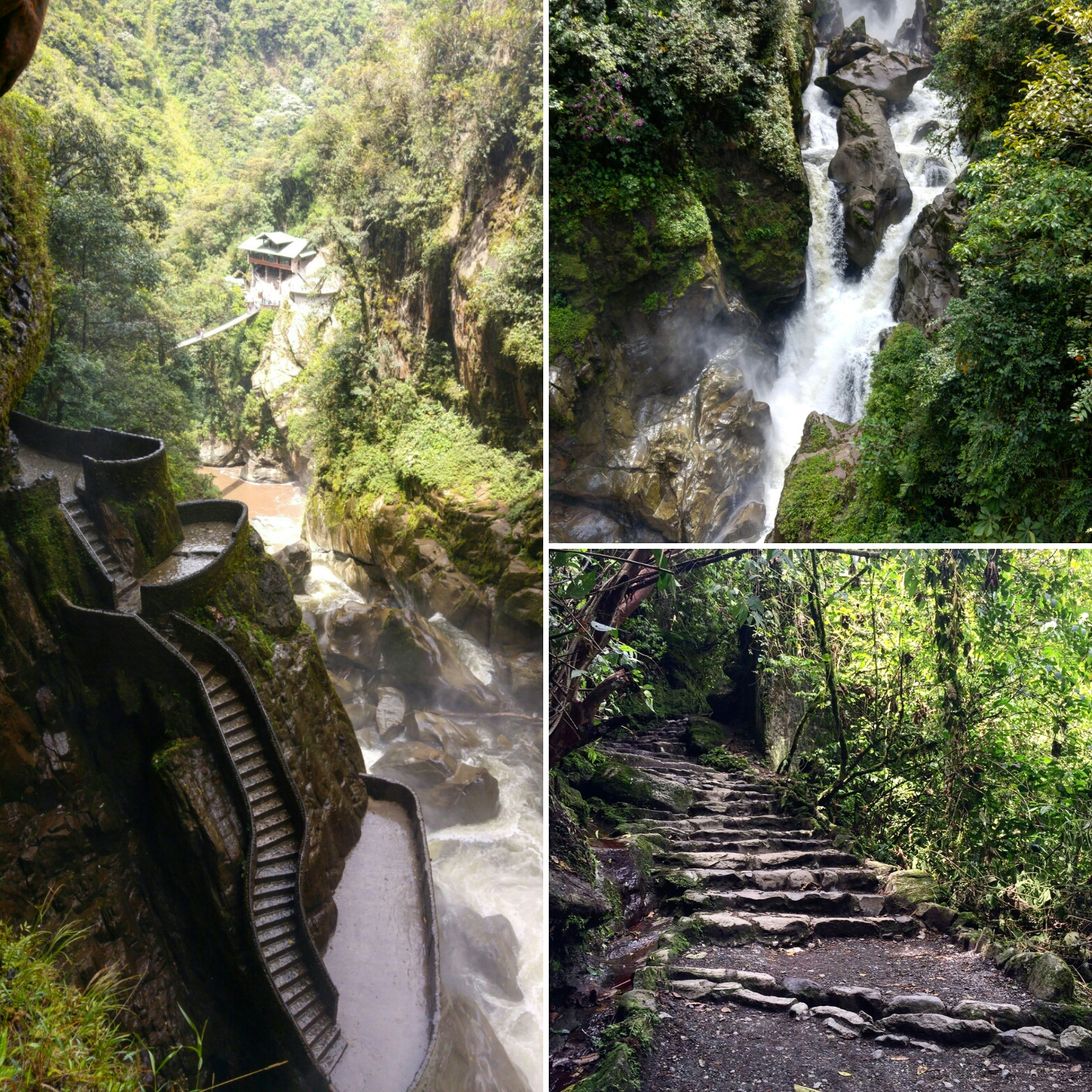 Colage de fotos del pailon del diablo ecuador